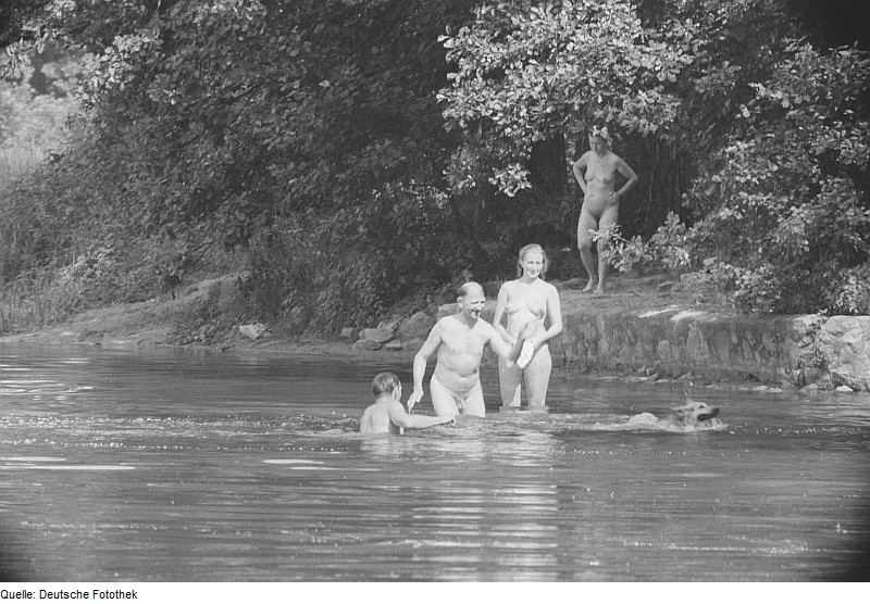 Original image description from the Deutsche FotothekBadende